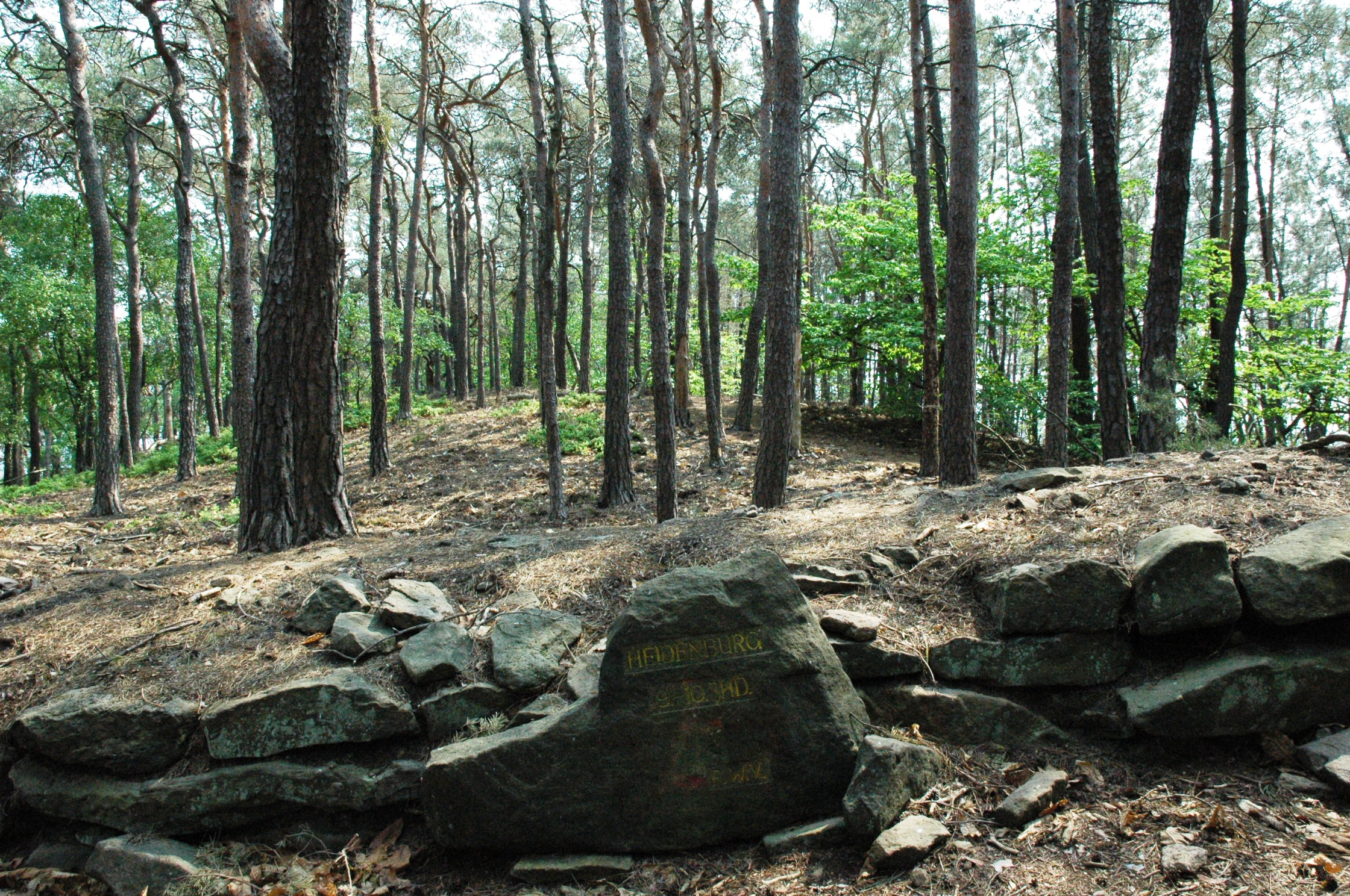 Ringwall Heidenburg